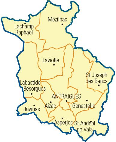 Carte détaillée des communes du canton (Ardèche)